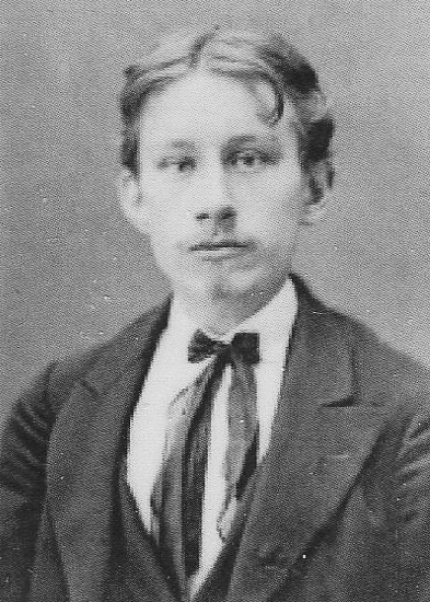 Konstgjutare Otto Meyer, ungdomsbild